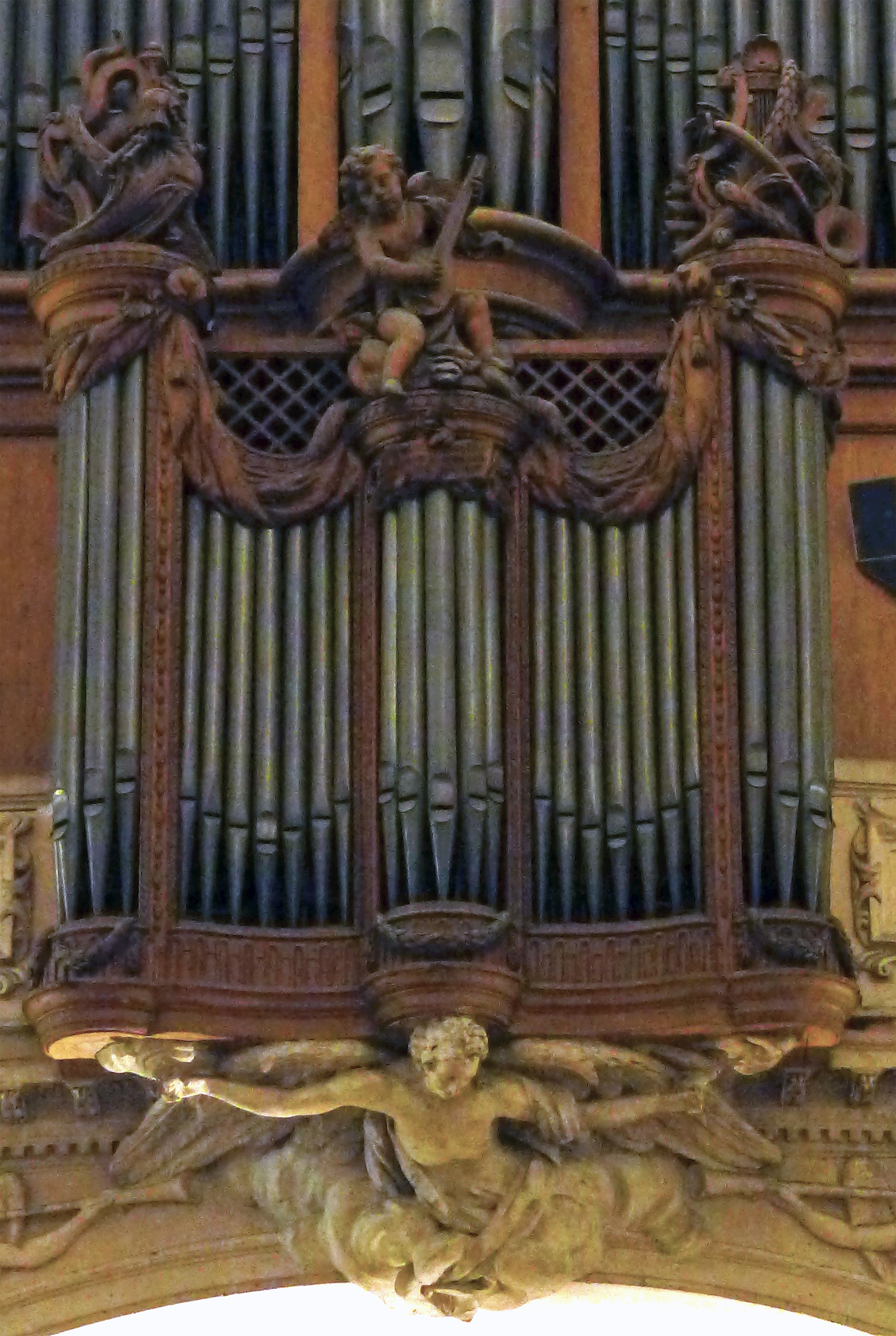 Église Saint-Gervais-Saint-Protais (orgue de tribune, détail) - Paris IV